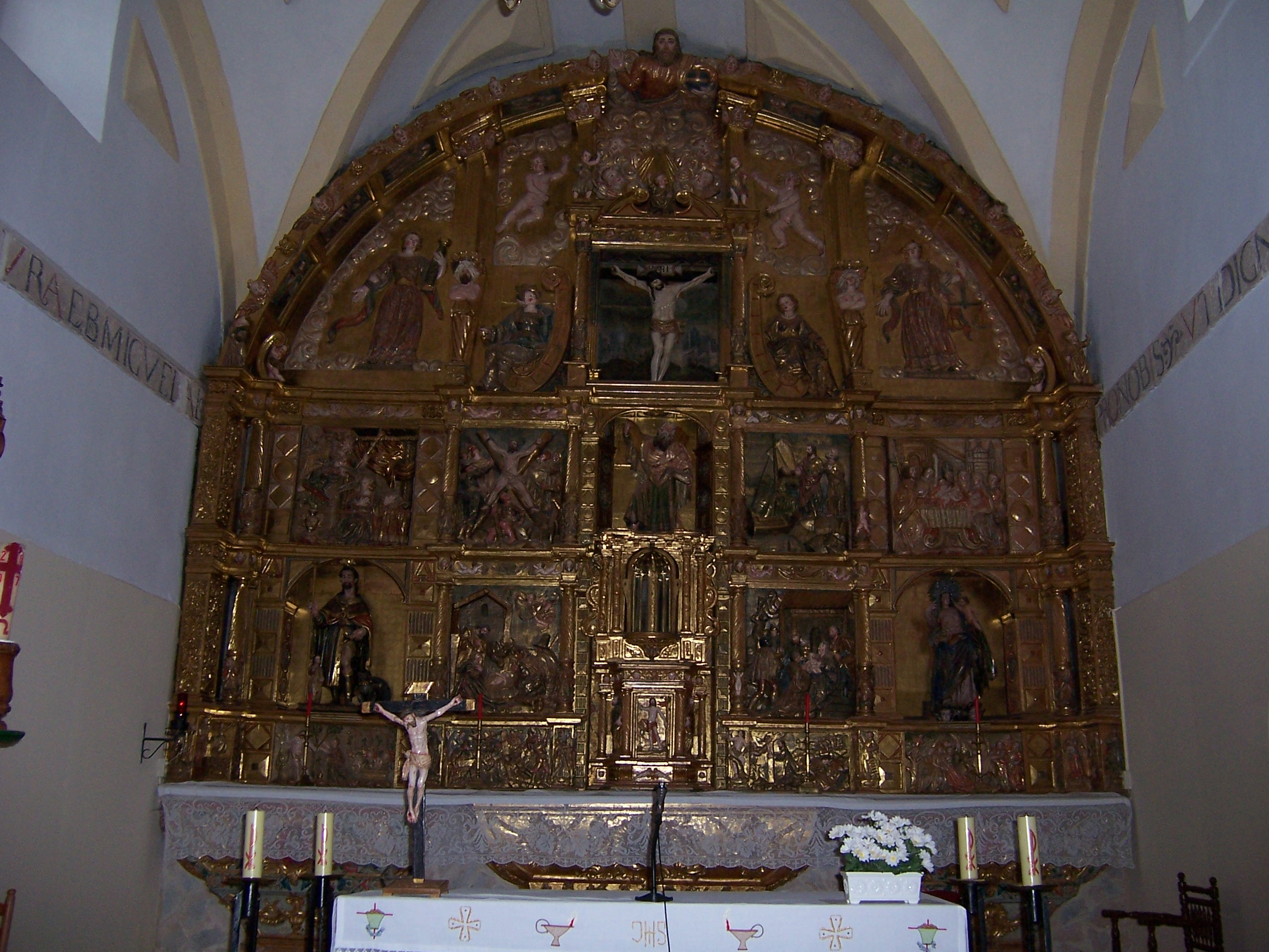 Retablo mayor de la iglesia